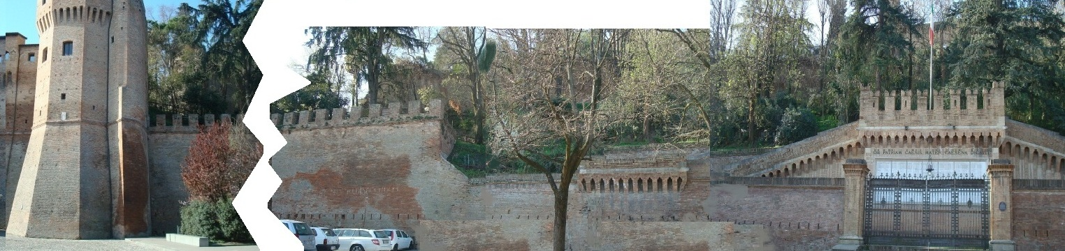 Cesena (Italie), Murailles basses en prologement de la Rocchetta du Piazza et de la Loggetta Veneziana (Photo montage)